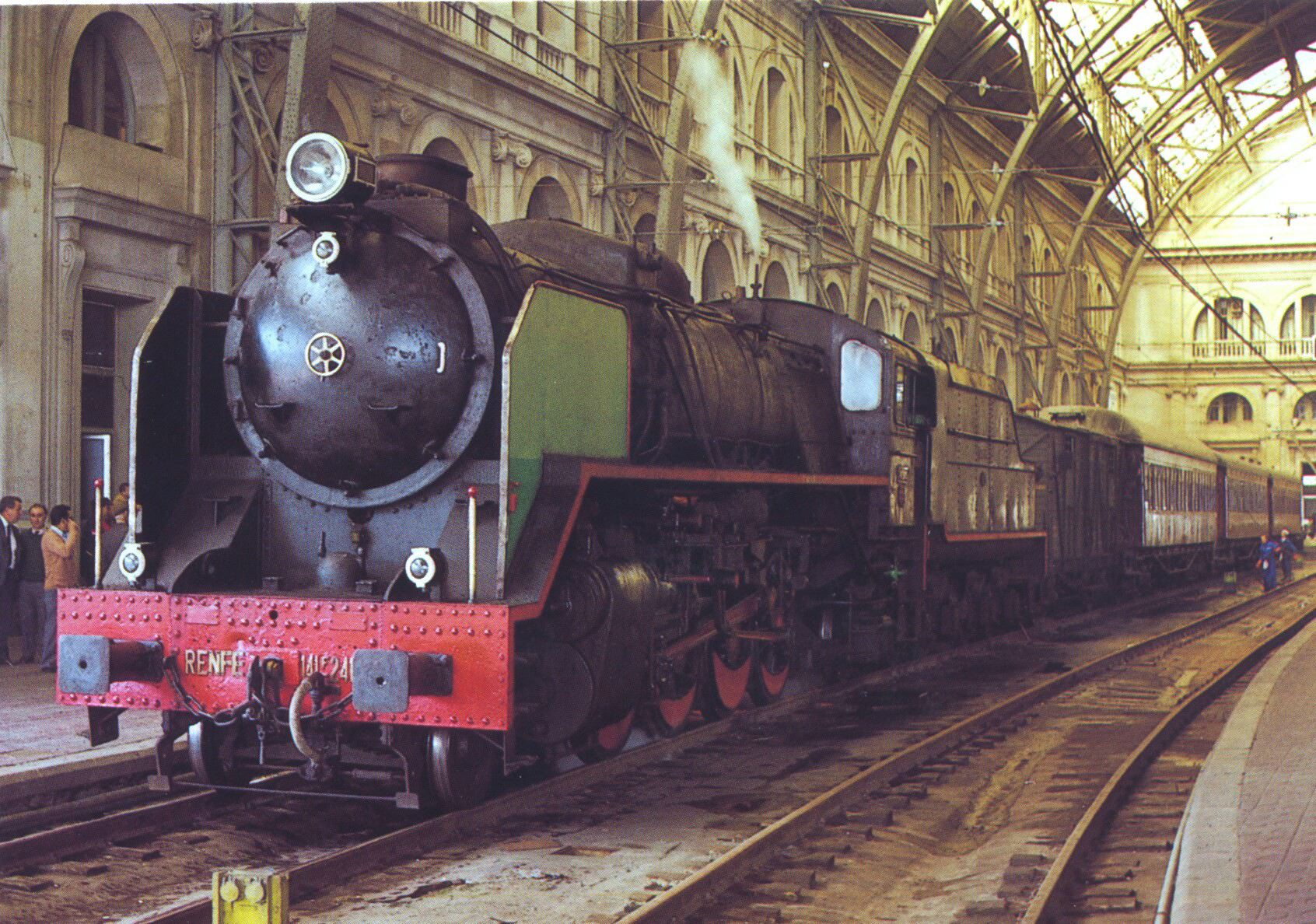 141 E 2413, Estació de França, Barcelona